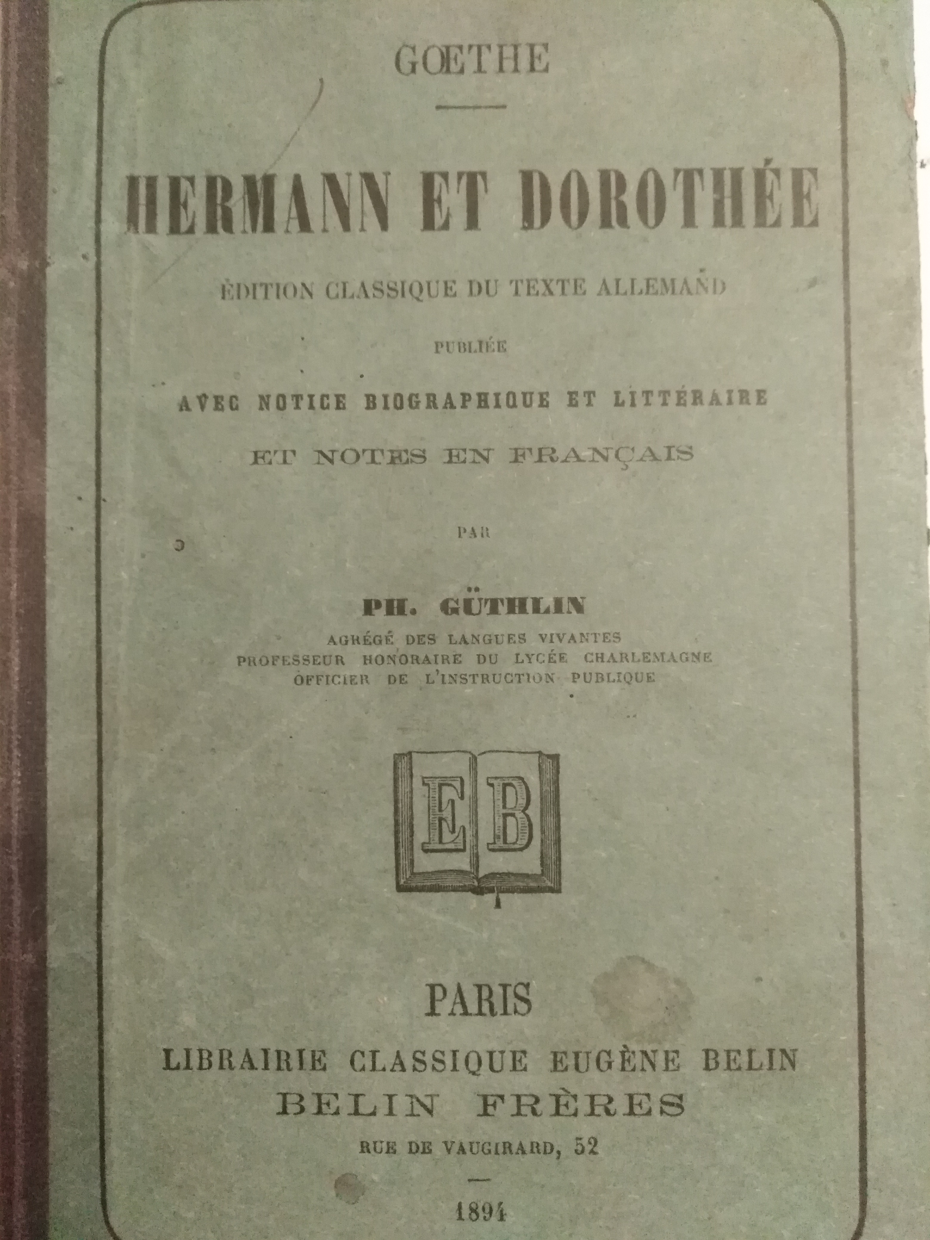 Philippe Guthlin édite en France une oeuvre allemande en l'enrichissant de notices biographique et littéraire, ainsi que de notes du texte en française